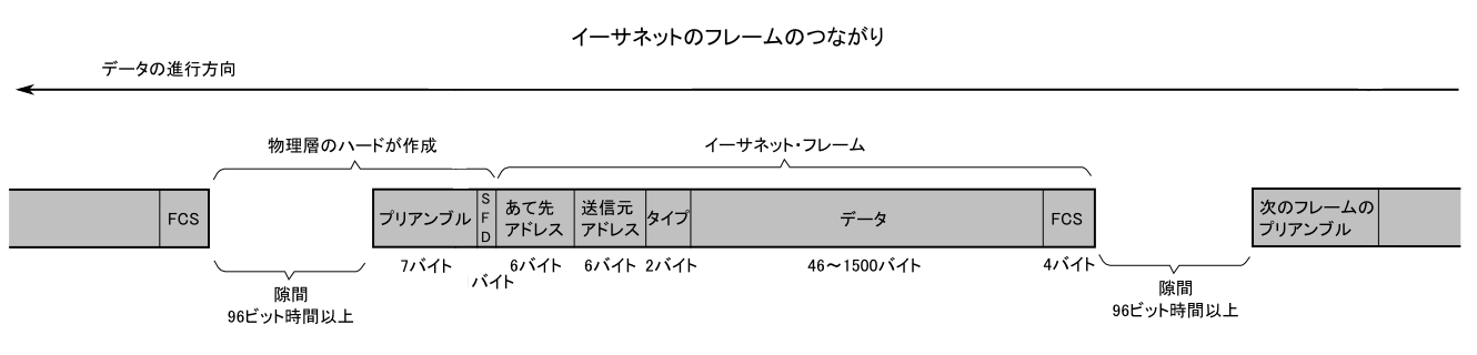 フレームのつながり.